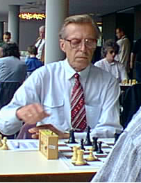 Aivars Gipslis, Dortmunder Schachtage 1998 Open A.